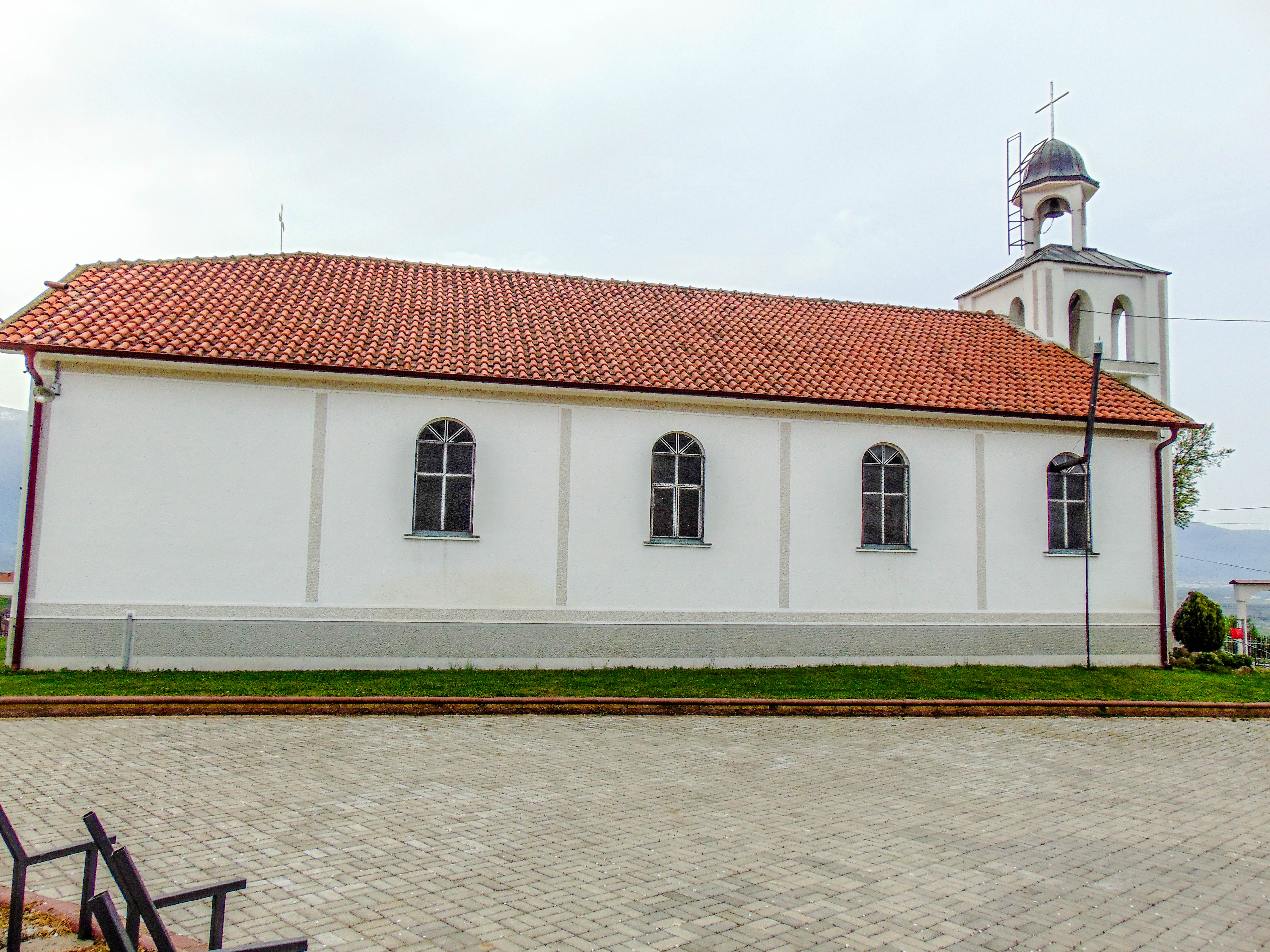 Црква „Св. Ѓорѓи“ - Сушица